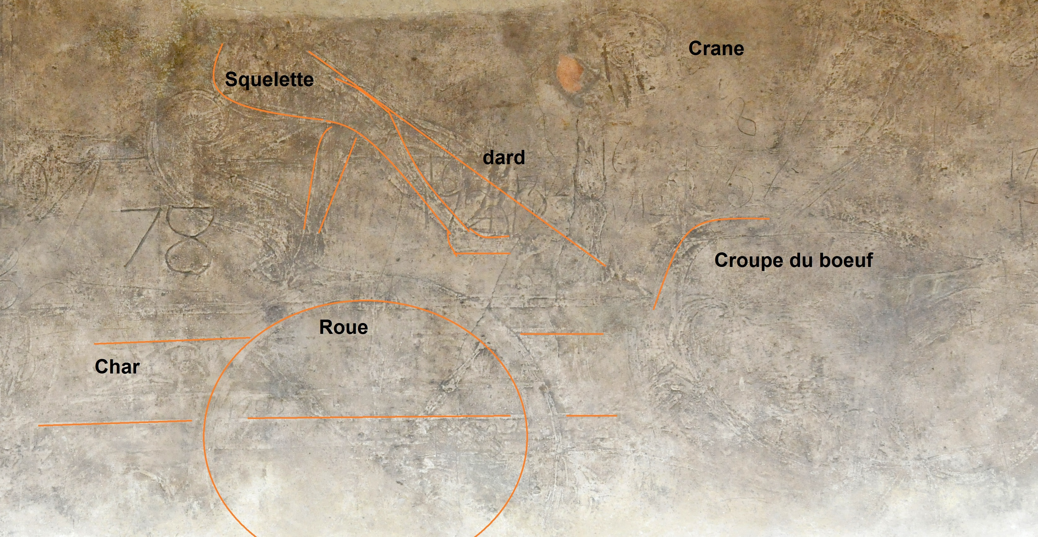 Détail de l'enduit sculpté présentant le triomphe de la mort sur le mur de galerie à l'aître de Brisgaret